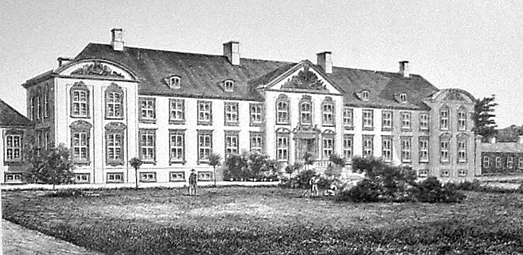 Lerchenborg. Hovedsæde under Grevskabet. Opført 1742 af Grev Chr. Lerche.